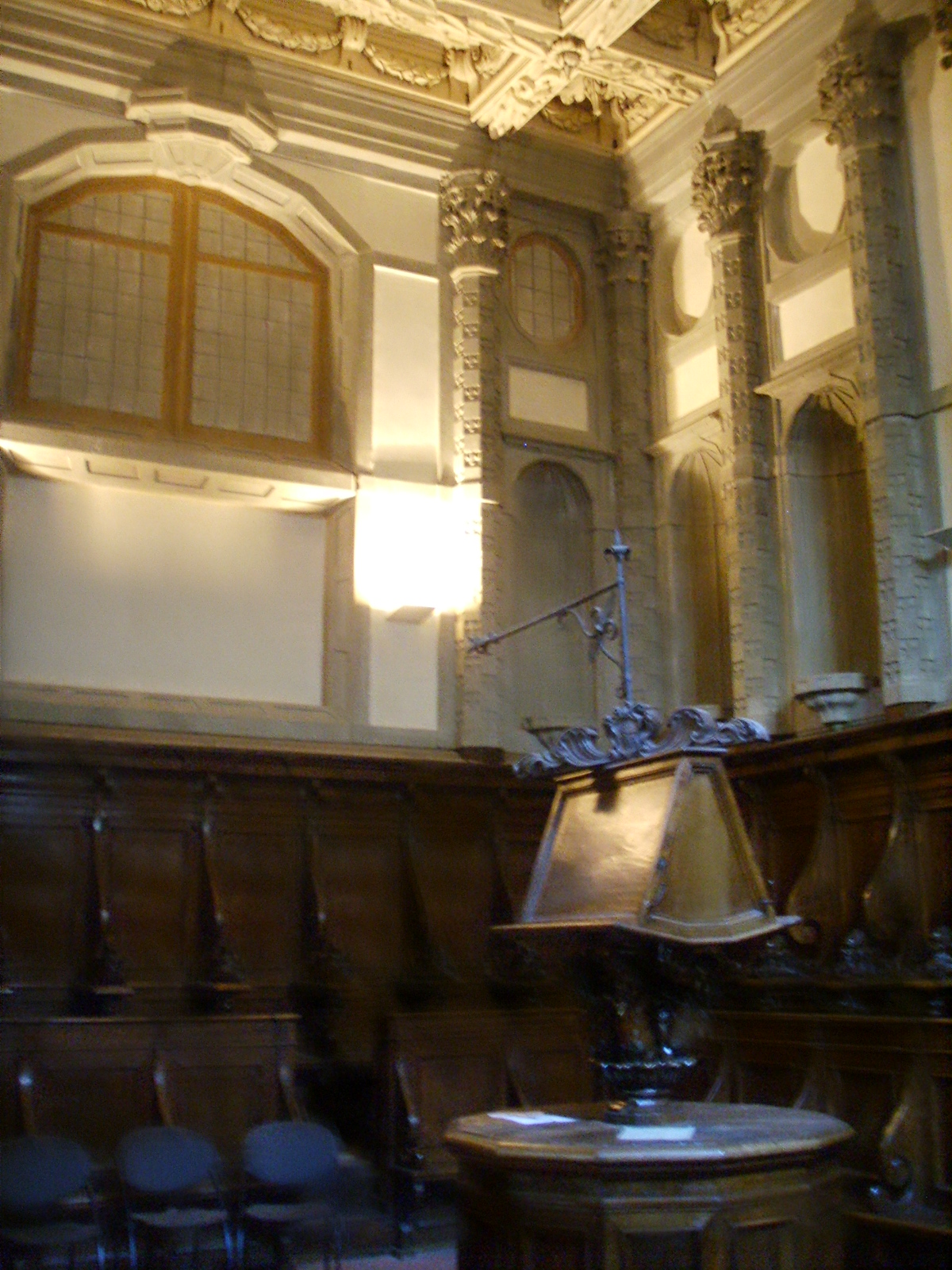 Santo Stefano al Ponte, il coro